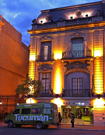 Edificio donde está ubicado el Ente Tucumán Turismo. 24 de Septiembre 484, San Miguel de Tucumán, Argentina.